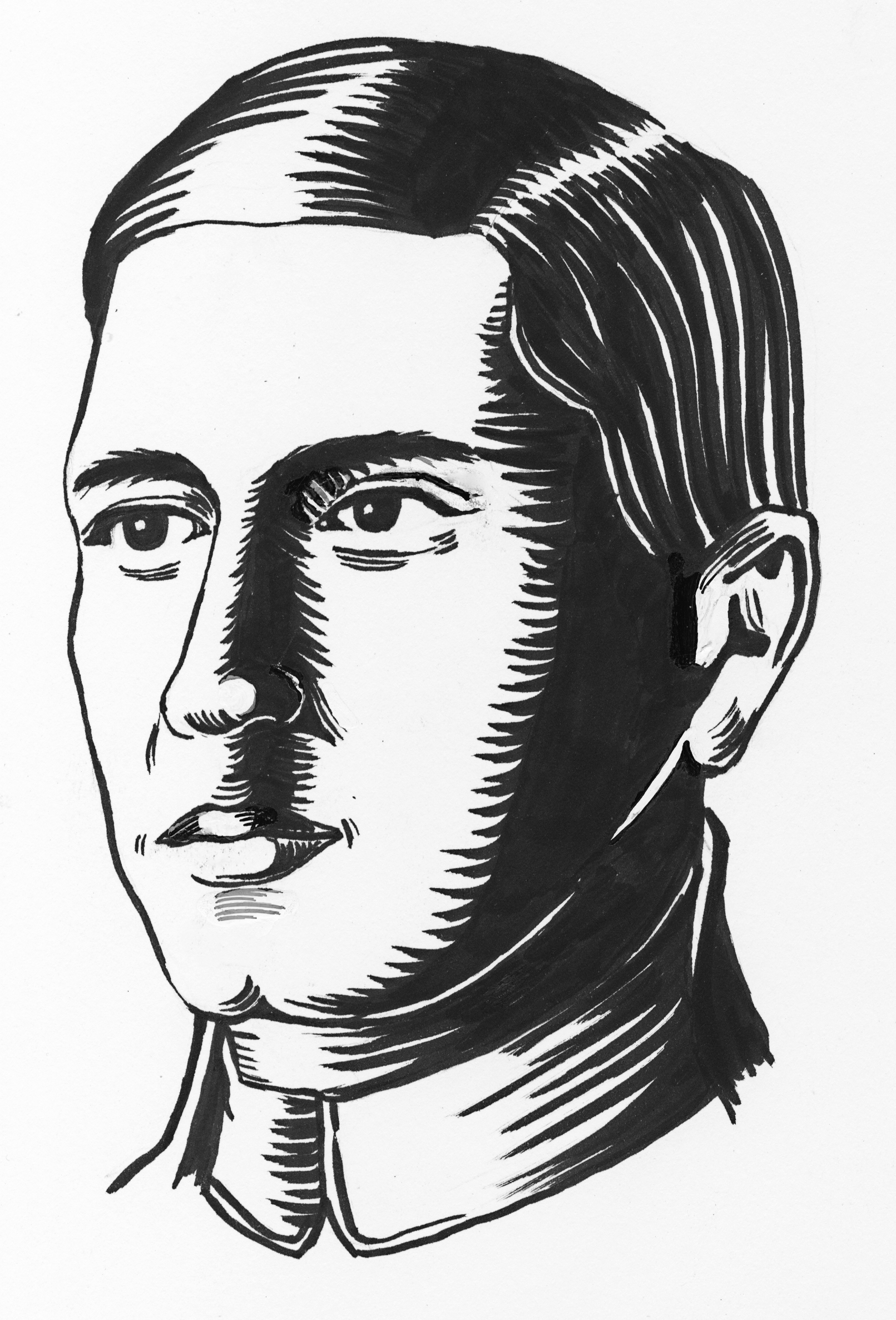 Edvin Leopold Rudolph Reinvaldt, tušš